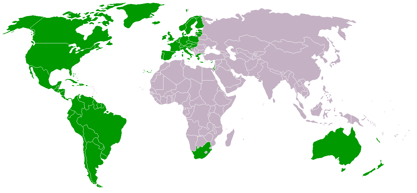 Ien foarbyld fan in seleksje fan lannen as "Westerske wrâld". Basearre op .